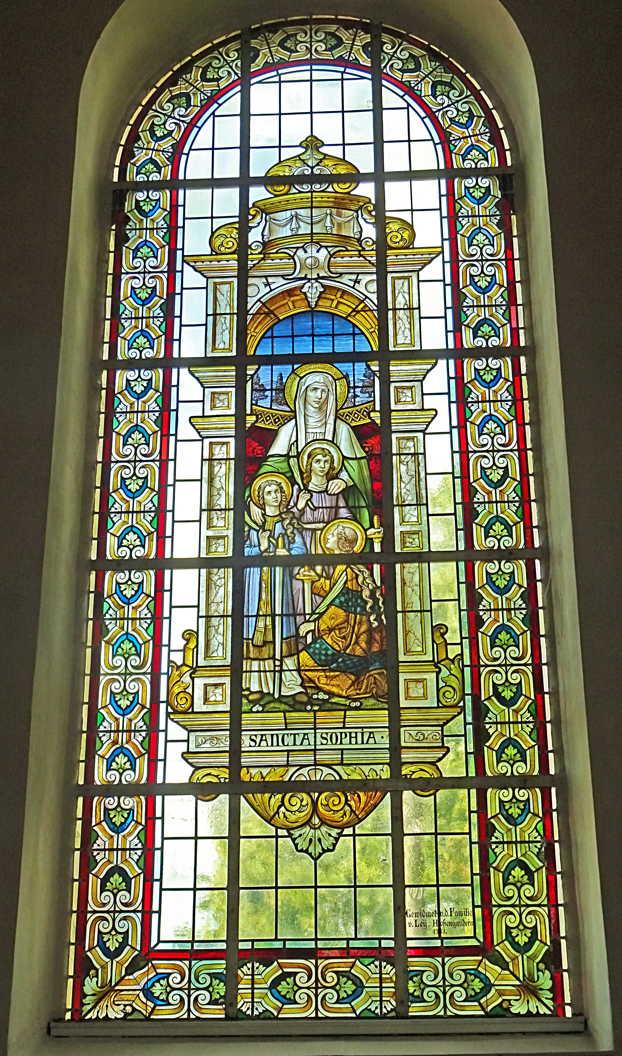 Buntglasfenster in der Dorfkirche St. Bartholomäus (Hohengandern)